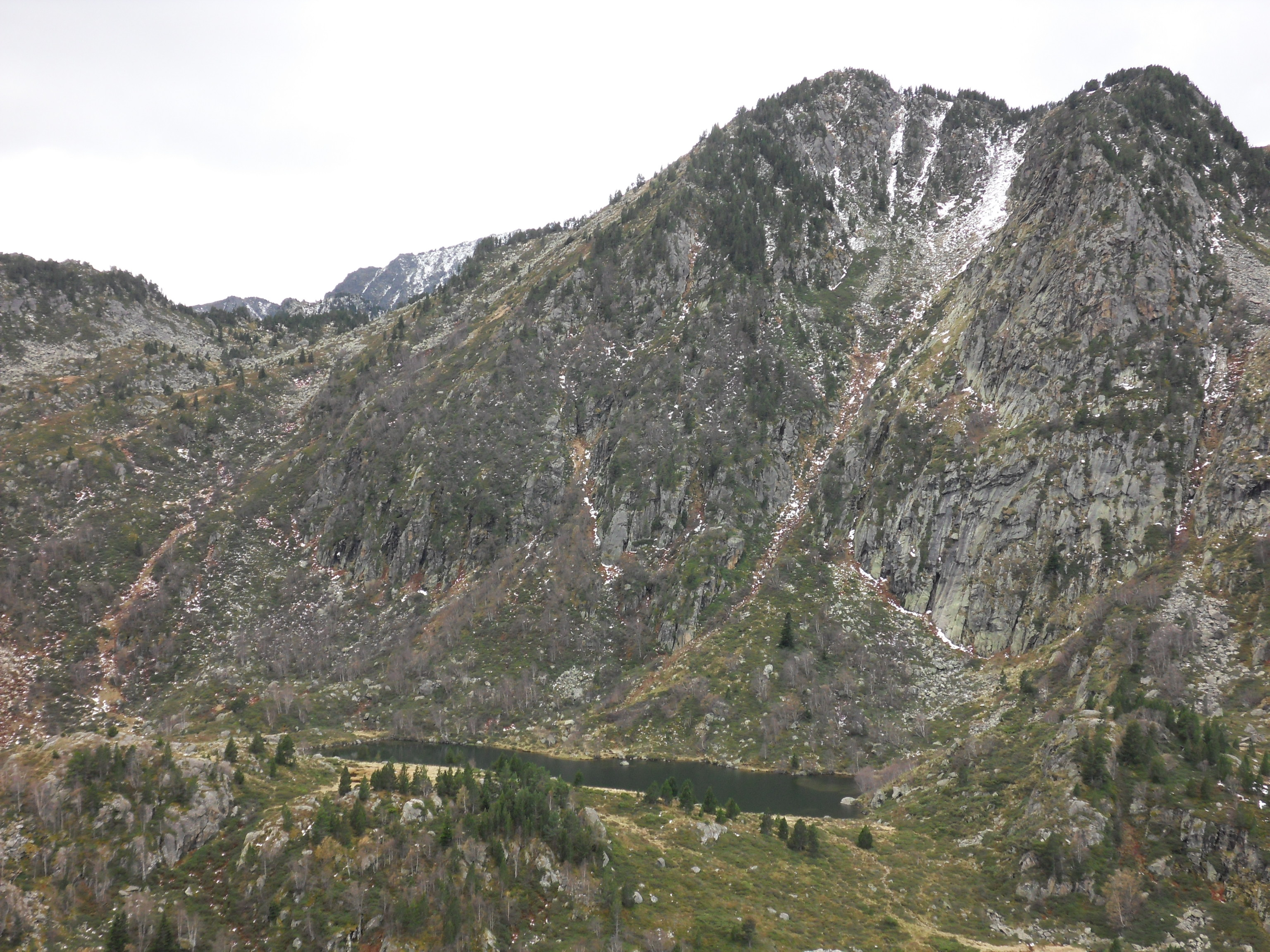 Etang de Larnoum, 1789 m, en Ariège, région Midi-Pyrénées, france